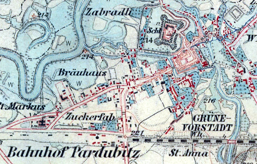 Mapa Pardubic z Třetího vojenského mapování, 1877-1880, 1 : 25 000